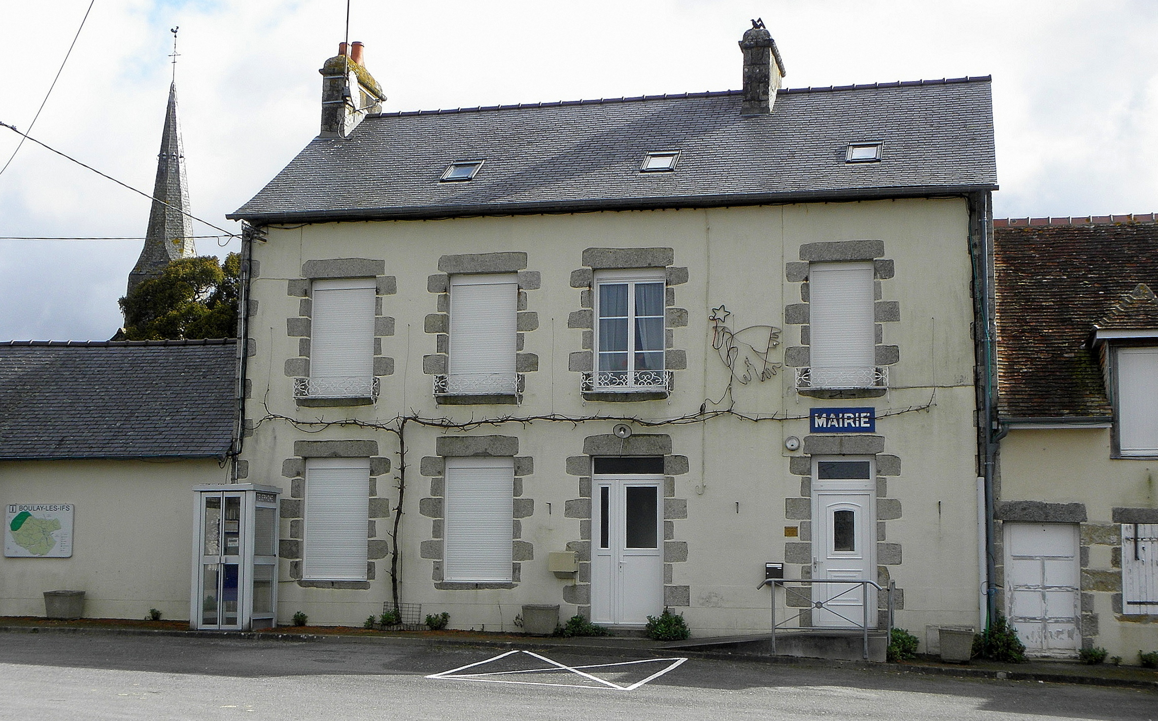 Mairie de Boulay-les-Ifs (53).